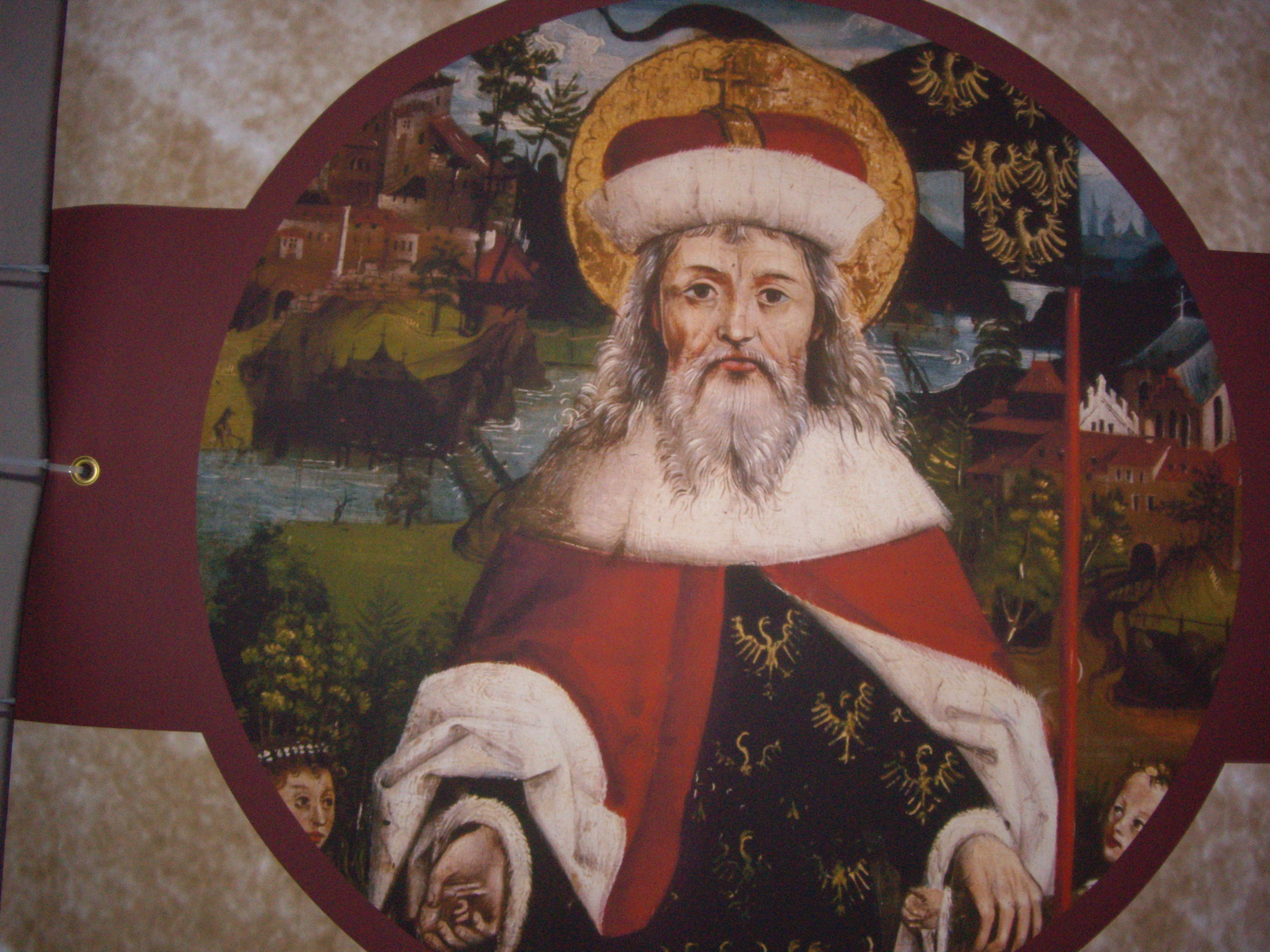 Sankta Leopoldo la 3-a sur afiŝo de Abatejo Klostronovburgo.